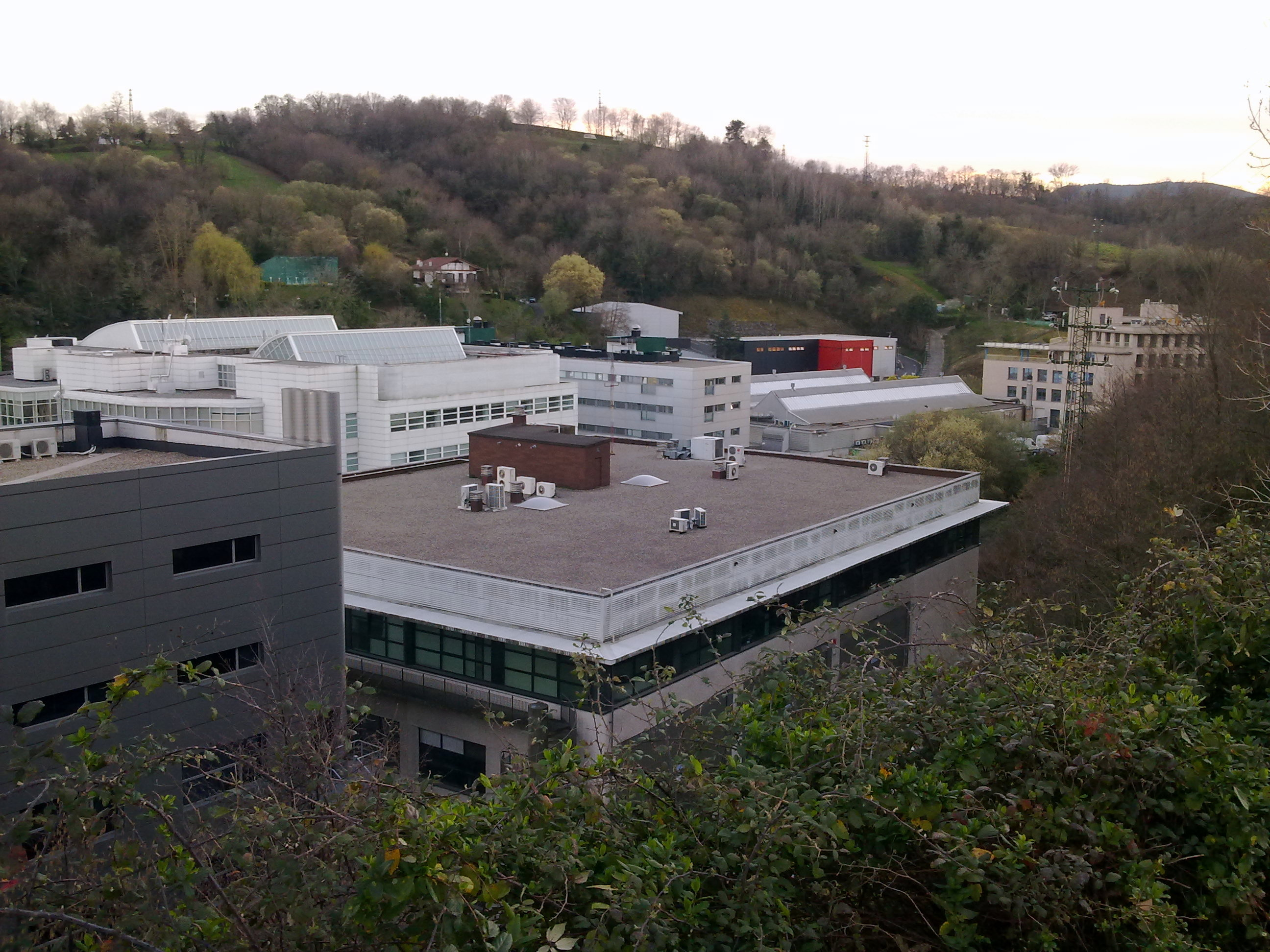 Igara industrialdea Berioko bidetik ikusita.